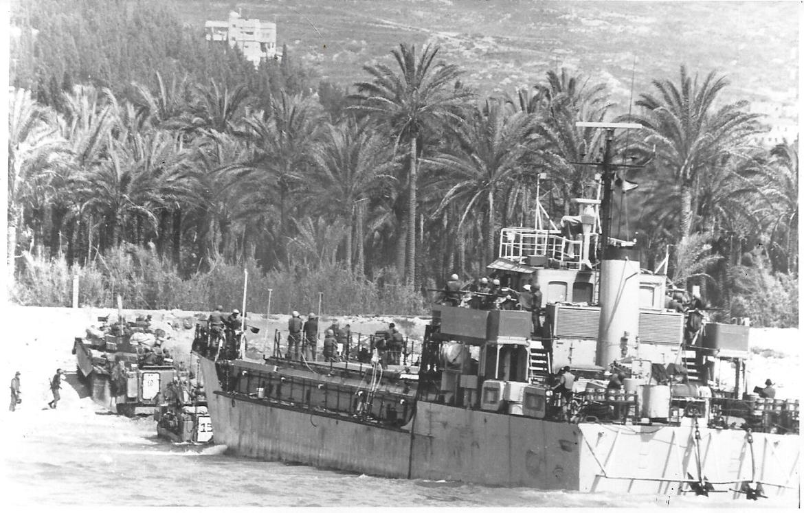 אח"י אשדוד פ-61 פורקת בחוף אוולי